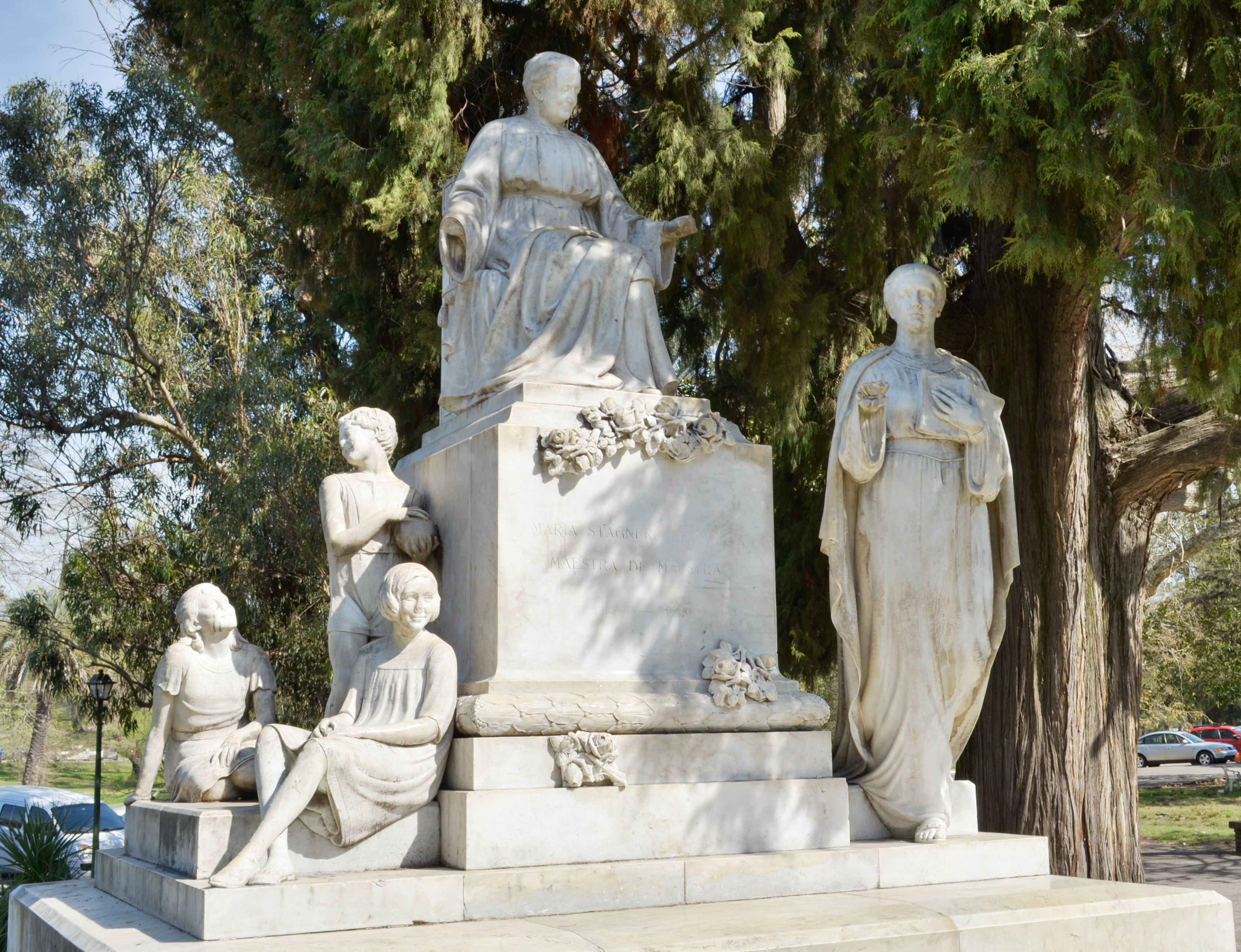 María Stagnero de Munar. Ubicada en el departamento de Montevideo